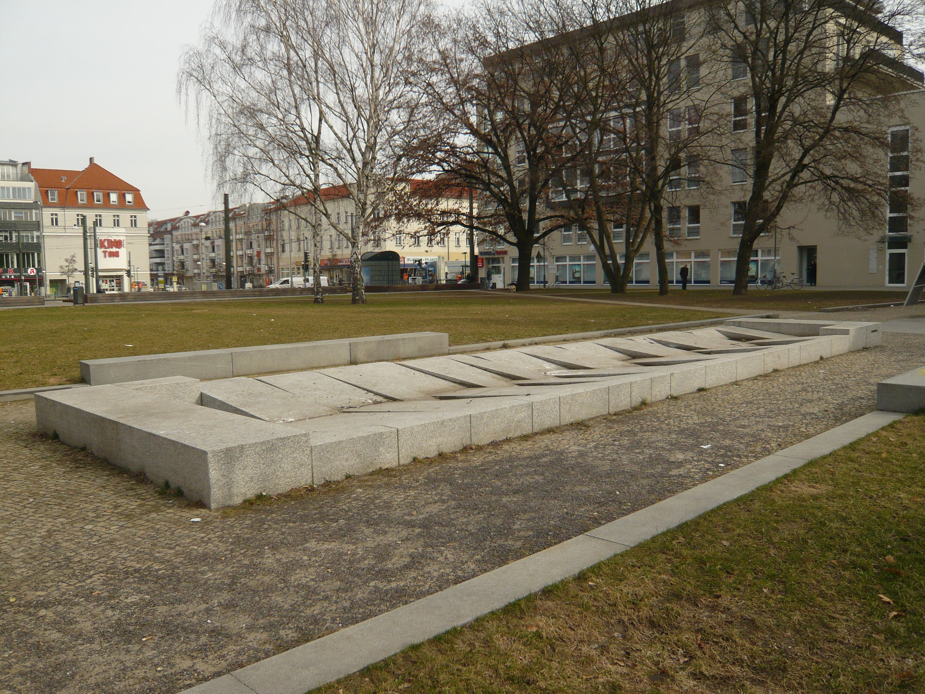 Antonplatz in Berlin-Weßensee